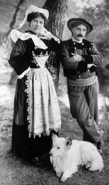 Costume traditionnel de bretagne (couple) en grand format No d'image 6 Titre Homme et femme. [Cote :PYO40P] (Léna Botrel et Théodore Botrel) Auteur Puyo, Constant (1857-1933) Titre [Bretagne vers 1900] / Constant Puyo, photogr. Publication [St Cyr] : [Direction du patrimoine. Archives photographiques], [1890-1910] Description 21 photogr. pos. sur verre, 1 photogr. nég.sur verre. : n. et b. ; 13 x 18 cm et moins (épr.) Licence GPL et GFDL Notes Acq. : Archives photographiques (Médiathèque du Patrimoine) (c) Caisse nationale des Monuments historiques Thème Ethnologie Sujet(s) Costume -- France -- Bretagne (France) -- 1870-1914 Rites et cérémonies -- France -- Bretagne (France) -- 1870-1914 Vie rurale -- France -- Bretagne (France) -- 1870-1914 Trouvé sur le site Gallica de la BNF